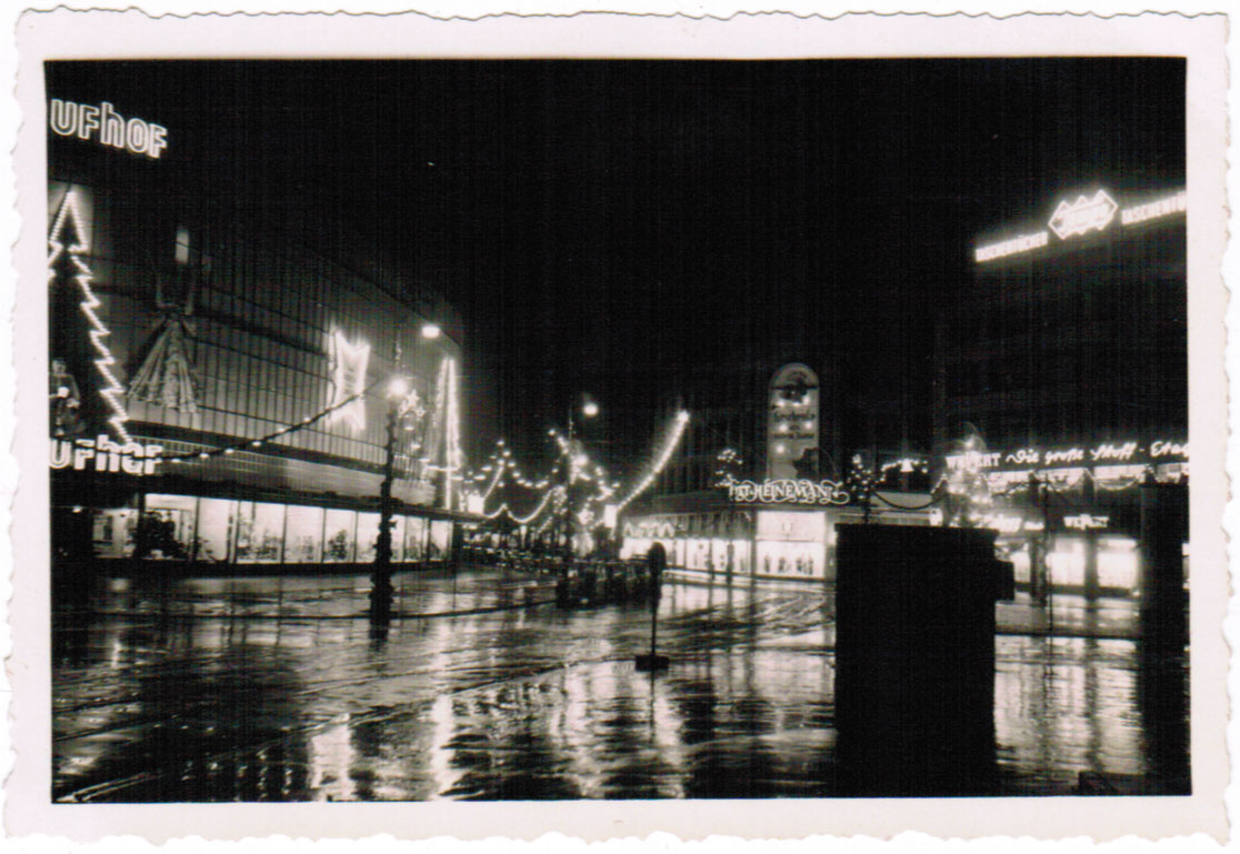 Weihnachten 1952 An der Hauptwache, Frankfurt am Main